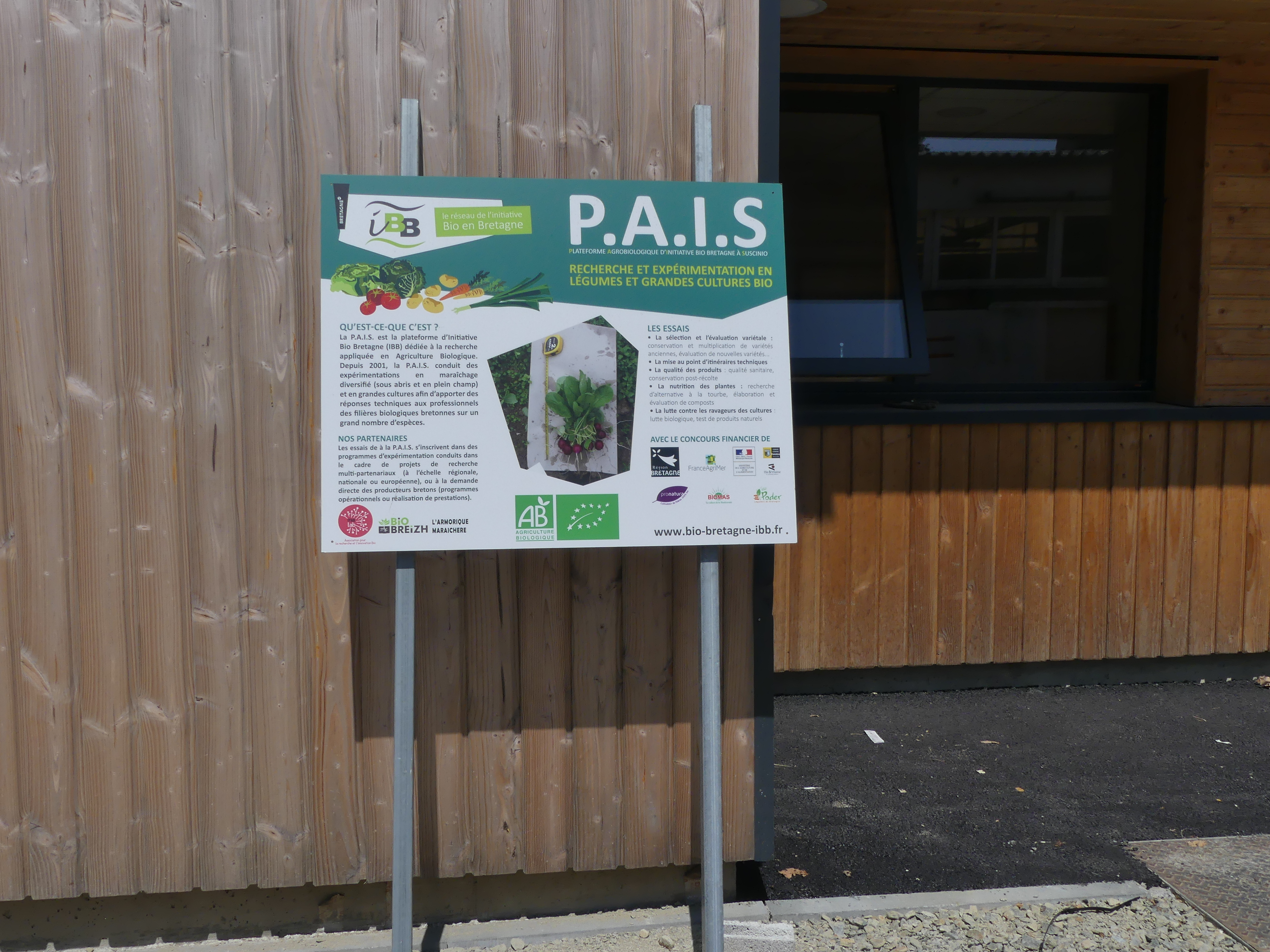 Panneau d'affichage PAIS à l'entrée de l'exploitation agricole de Suscinio (Ploujean)